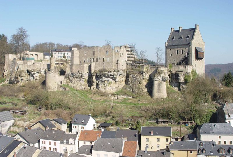 Die Burg Fels in Luxemburg